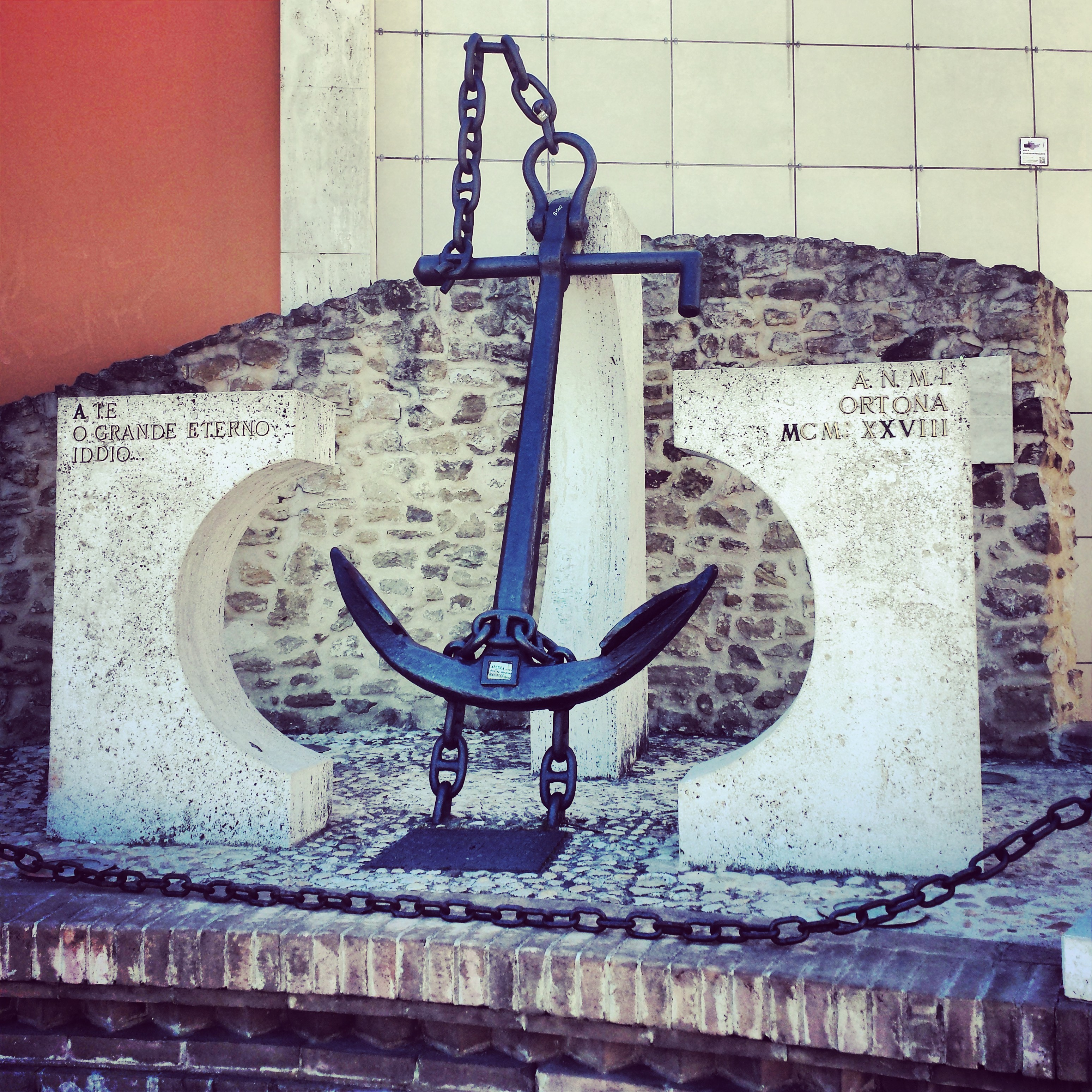 L'ancora del monumento ANMI, dedicata ai caduti del mare. Ortona (CH) 2013